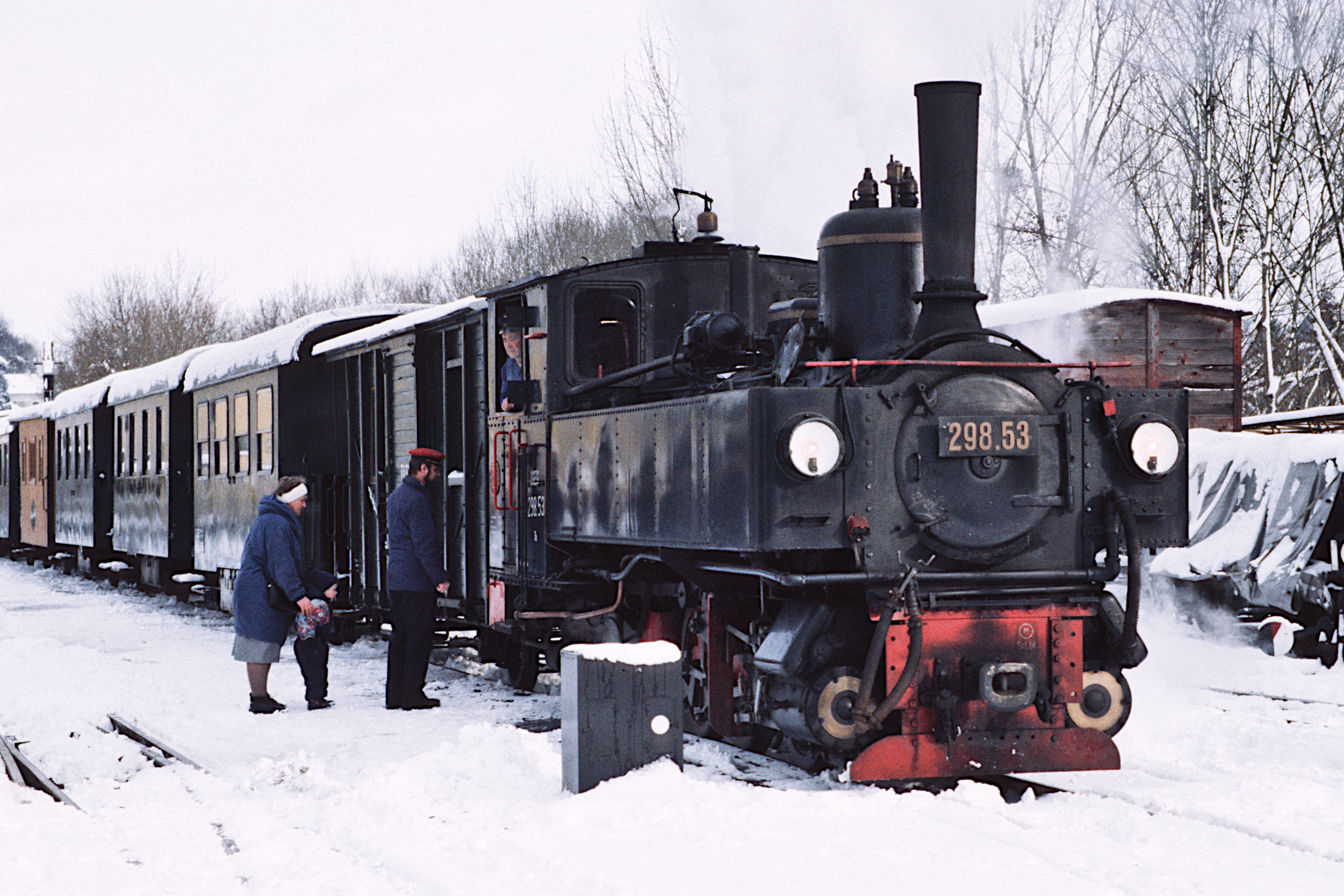 en: The Steyrtalbahn in Upper Austria is one of the few Austrian heritage railways operational during winter time. This is 298.53 in Grünburg station. de: Die Steyrtalbahn in Oberösterreich ist eine der wenigen österreichischen Museumsbahnen mit Winterbetrieb. Hier ist 298.53 im Bahnhof Grünburg.